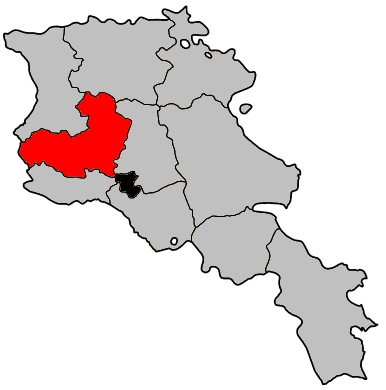 Carte de l'Arménie avec les zones touchées par le virus H1N1. Gris : pas touché Rouge : cas avéré Noir : décès